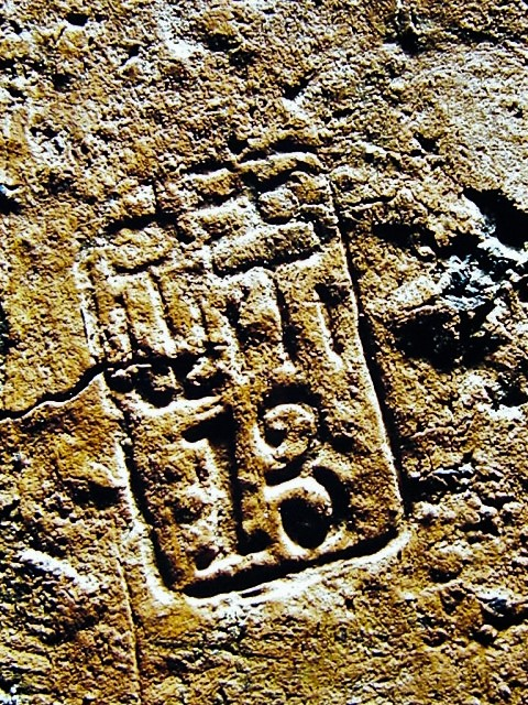 琵琶湖疎水事務所煉瓦製造所製煉瓦 1886年～1889年製造 京都市山科区製造所跡地にて出土